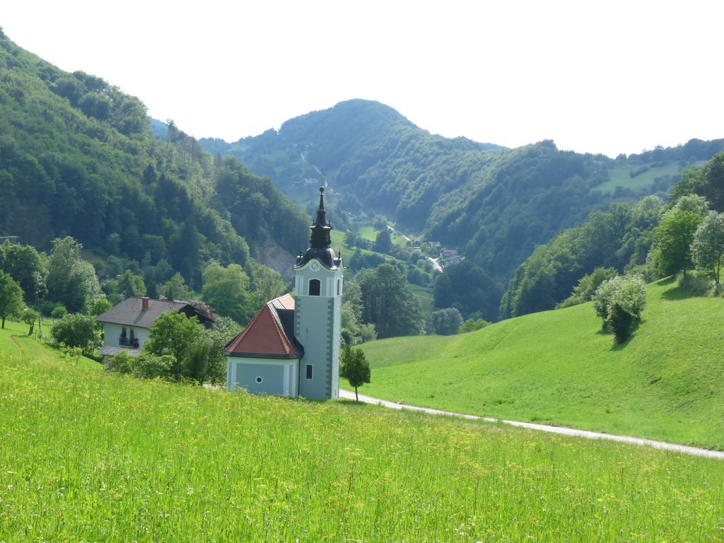 Sv. Ana v Šemniku, zadaj Strahovlje.